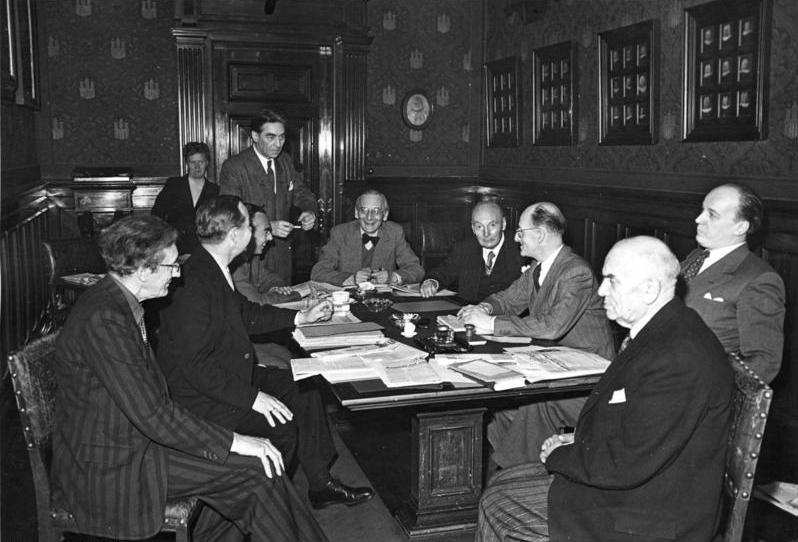 Hamburg, Tagung PEN-Zentrum Illus-dpd Pen-Tagung in Hamburg. Das "Pen-Zentrum Deutschland" - die im November 1948 gebildete Gruppe des internationalen PEN - trat am 12-4-49 in Hamburg zu einer ersten Tagung zusammen. Unser Bild zeigt die erste Arbeitssitzung im Kleinen Sitzungssaal des Hamburger Rathauses. V.r.n.l. um den Tisch sitzend: Prof. [Herbert] Friedmann - Dolf Sternberger - Axel Eggebrecht - Herbert Eulenberg - Hermann Kasack - Rudolf Schneider-Schelde (stehend) - Erich Kästner - Hans Henny Jahnn und Ernst Penzoldt. 3090-49 Abgebildete Personen: Sternberger, Dolf Prof. Dr.: Publizist, Politologe, Präsident des PEN-Zentrums, Bundesrepublik Deutschland Eggebrecht, Axel: Schriftsteller, Mitglied des PEN-Zentrums, Bundesrepublik Deutschland Eulenberg, Herbert: Schriftsteller, Dichter, Deutschland Kasack, Hermann: Schriftsteller, Mitglied des PEN-Zentrums, Bundesrepublik Deutschland Penzoldt, Ernst: Schriftsteller, Bundesrepublik Deutschland